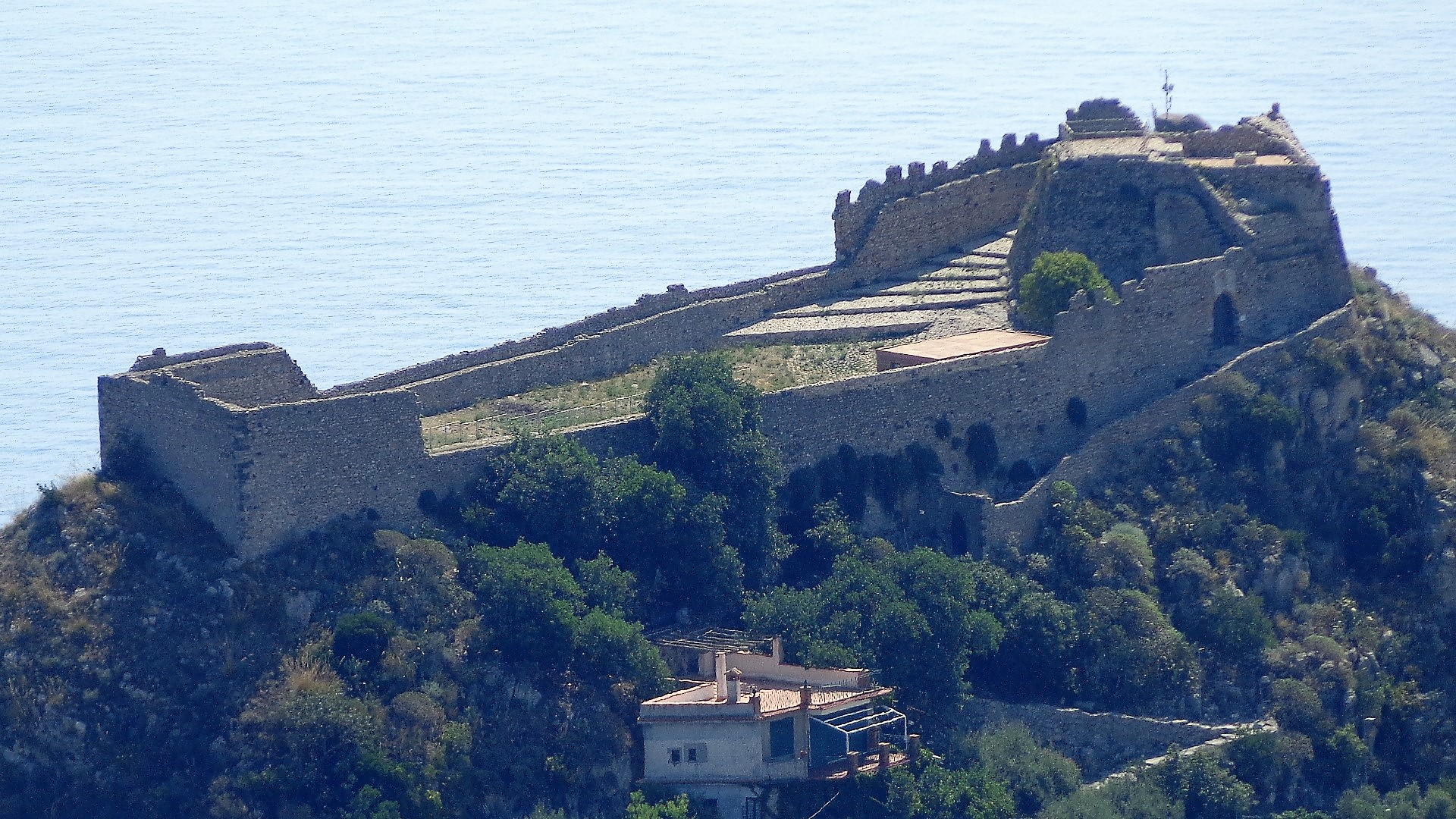 Panorama e dettaglio sul castello di Taormina.